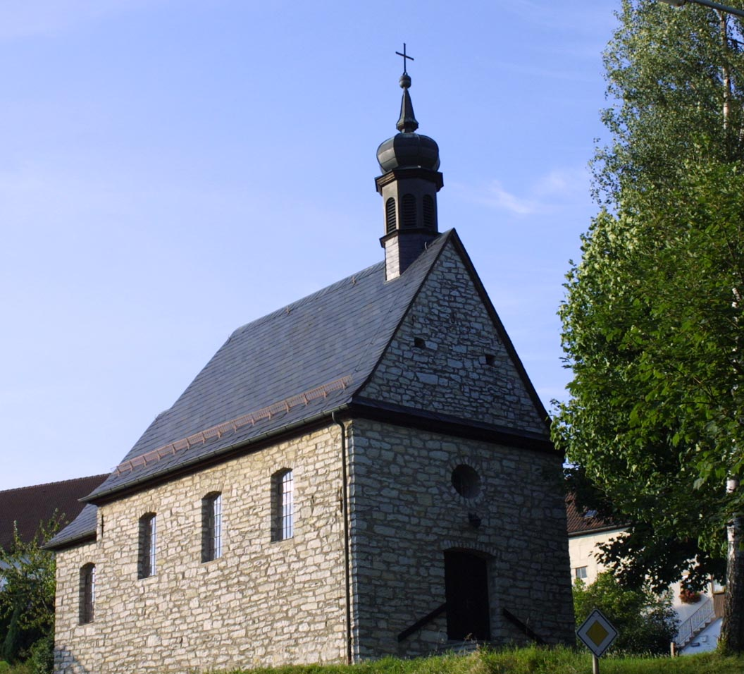 Laibarös near Bamberg (Franconia)